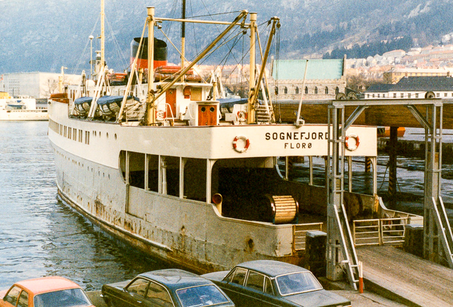 MS Sognefjord i Bergen i 1982